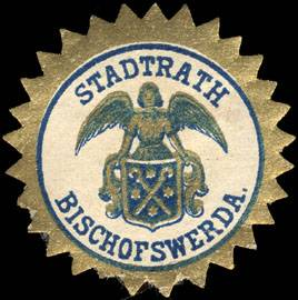 Sealing stamp Title: Stadtrath Bischofswerda Description: Place: Bischofswerda size: 3 cm